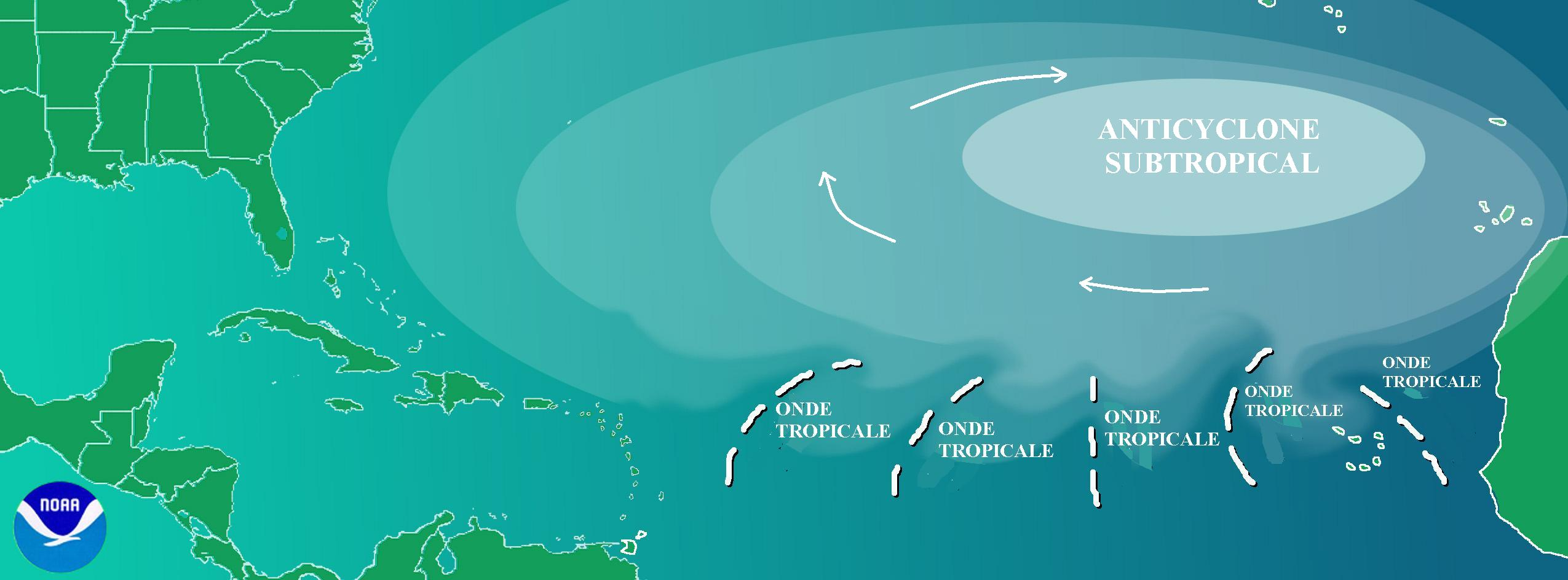 Version française du diagramme montrant la circulation générée par l'Anticyclone subtropical de l'Atlantique nord (Anticyclone des Bermudes ou des Açores) et son influence sur la trajectoire des ondes tropicales qui sortent de la côte africaine. Ces ondes se déplacent en général d'est en ouest dans le flux d'alizé de la basse troposphère au-dessus de l'océan Atlantique. Elles apparaissent le plus souvent en avril/mai et se maintiennent jusqu'en octobre/novembre. Les ondes ont généralement une période de 3 ou 4 jours et une longueur d'onde de 2 000 à 2 500 km (Burpee 1974). Il faut garder à l'esprit qu'il serait plus juste de considérer les « ondes » comme des dépressions convectives actives le long d'un train d'ondes étendu. En moyenne, environ 60 ondes sont générées sur l'Afrique du Nord chaque année, mais il semble qu'il n'y ait pas de relation directe entre leur nombre et l'intensité de l'activité cyclonique annuelle dans le bassin Atlantique. Alors qu'environ 60% seulement des tempêtes tropicales de l'Atlantique et des faibles ouragans (catégories 1 et 2 sur l'échelle de Saffir-Simpson) proviennent des ondes d'est, elles sont à l'origine de près de 85% des ouragans intenses (ou majeurs) (Landsea 1993). On suppose toutefois que la plupart des cyclones tropicaux du Pacifique Est ont une origine africaine (Avila and Pasch 1995). On ignore actuellement tout des mécanismes d'évolution de ces ondes au fil des ans, tant en intensité qu'en position, et dans quelle mesure elles sont liées à l'activité cyclonique dans l'Atlantique (et le Pacifique Est).